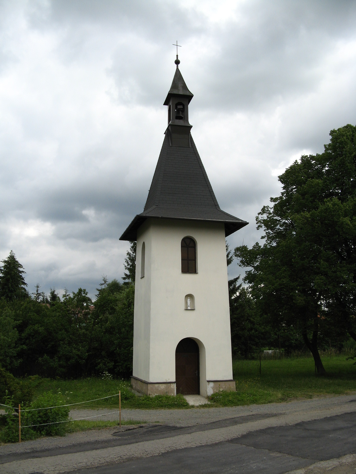 Zvonice (Niva), střed obce, Niva